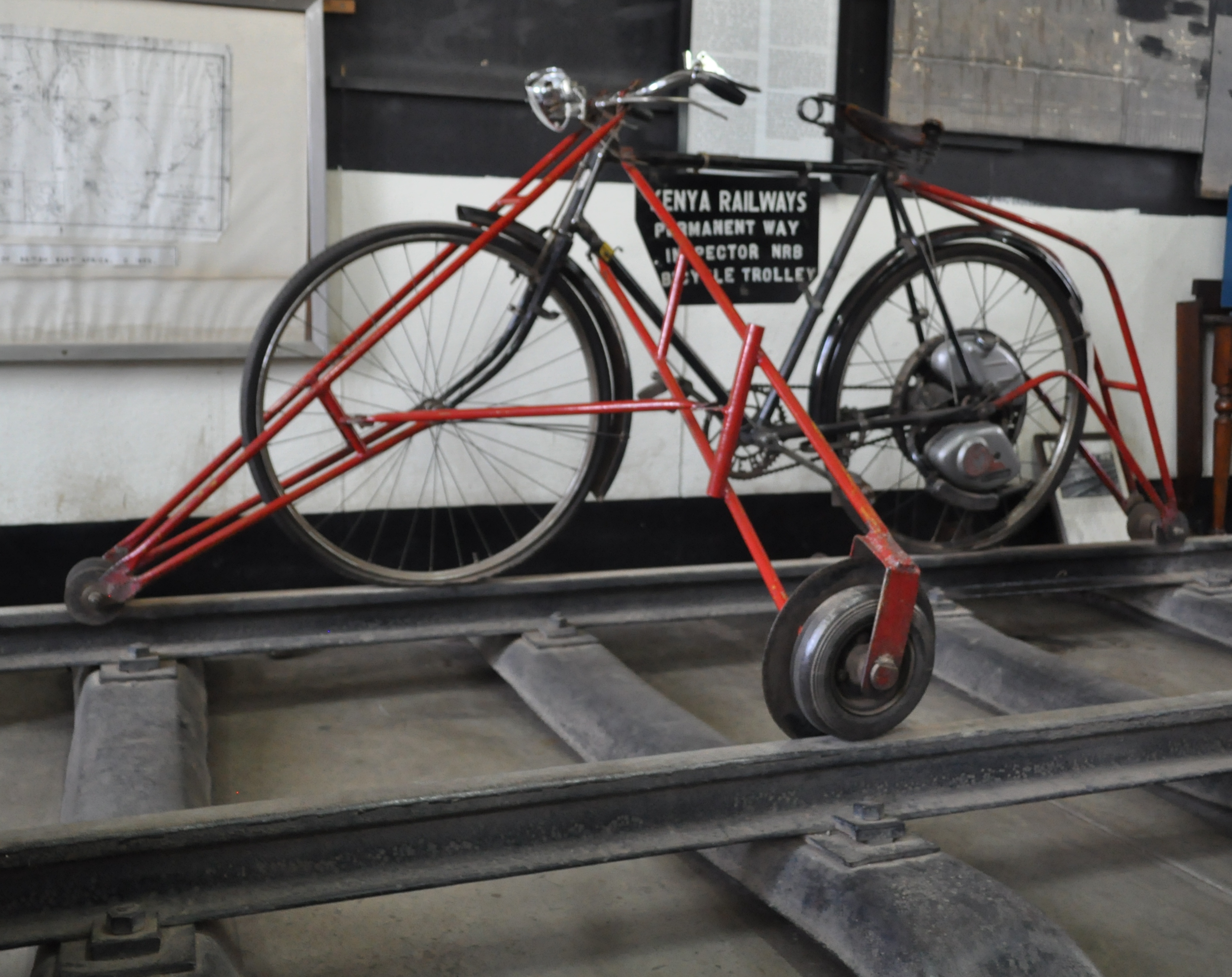 Kenya Railways